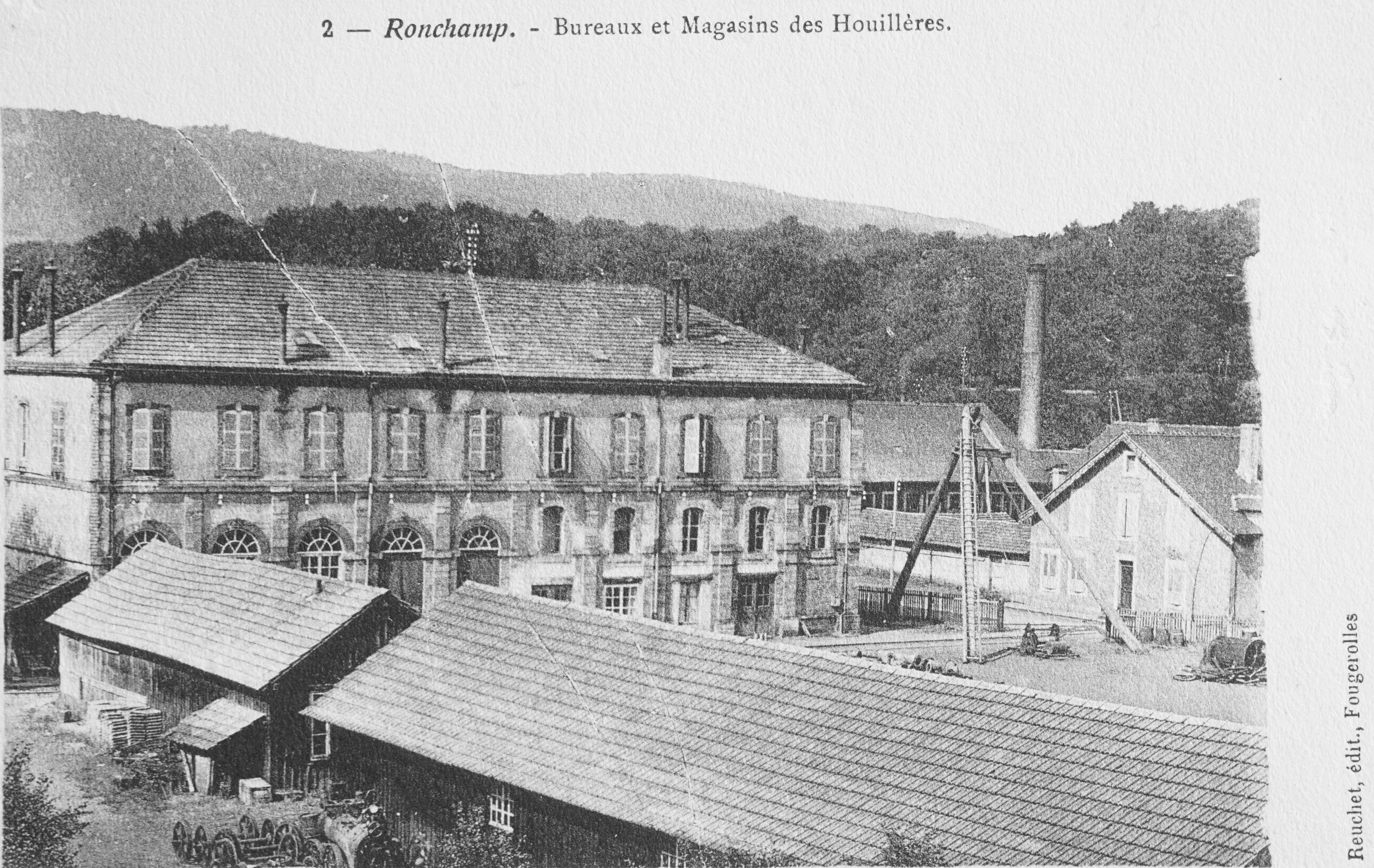 Les ateliers centraux et les bureaux administratifs des houillères de Ronchamp